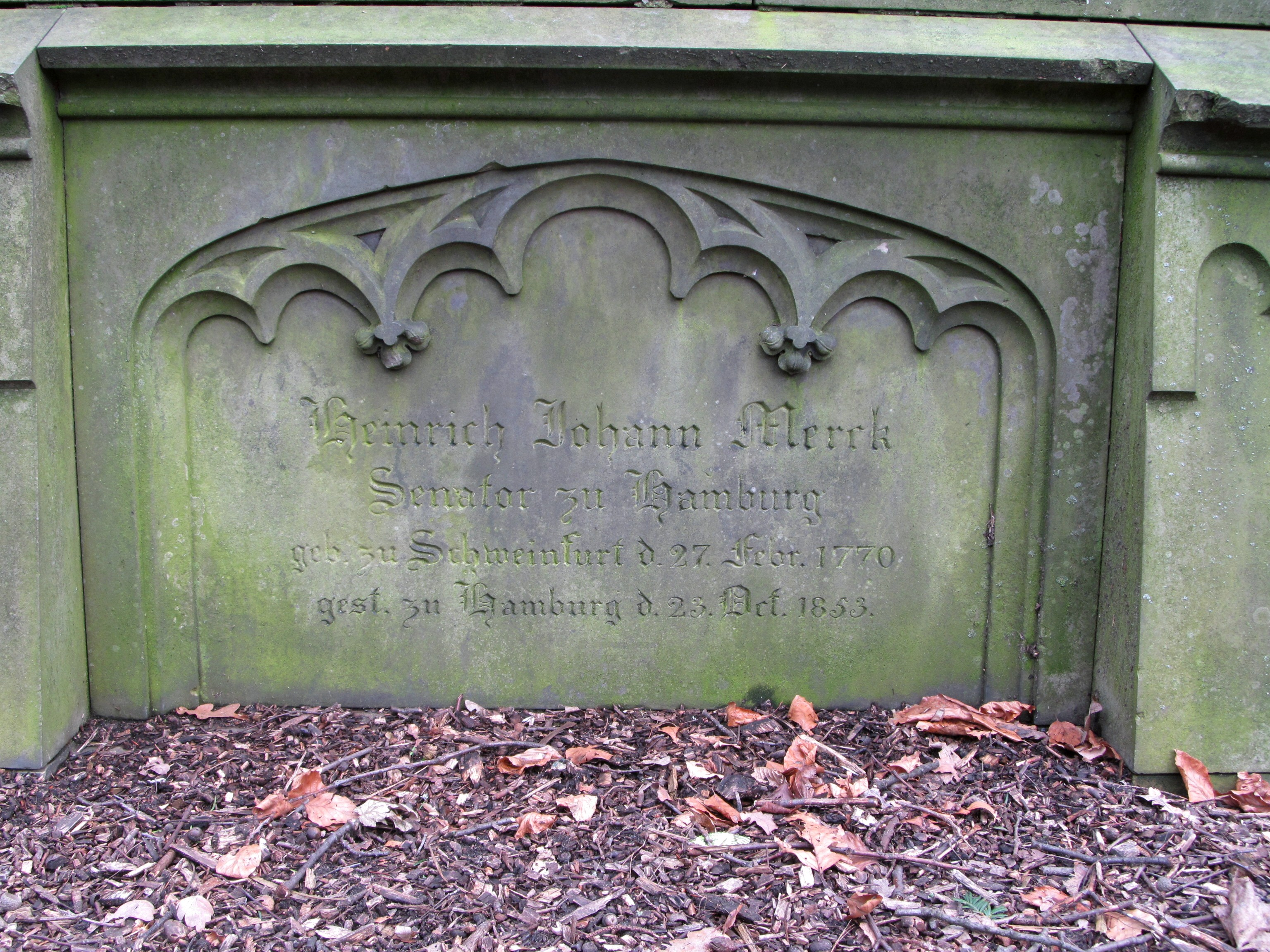 Familiengrabmal Merck im Jacobipark in Hamburg-Eilbek, Epitaph für Heinrich Johann Merck (1770–1853), Hamburger Senator und Gründer von H. J. Merck & Co.